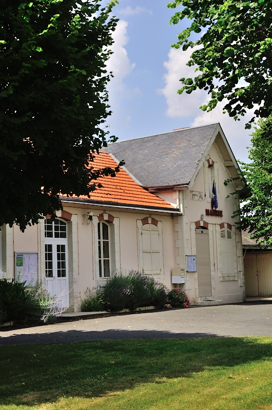 Marie de Bretagne (Indre)